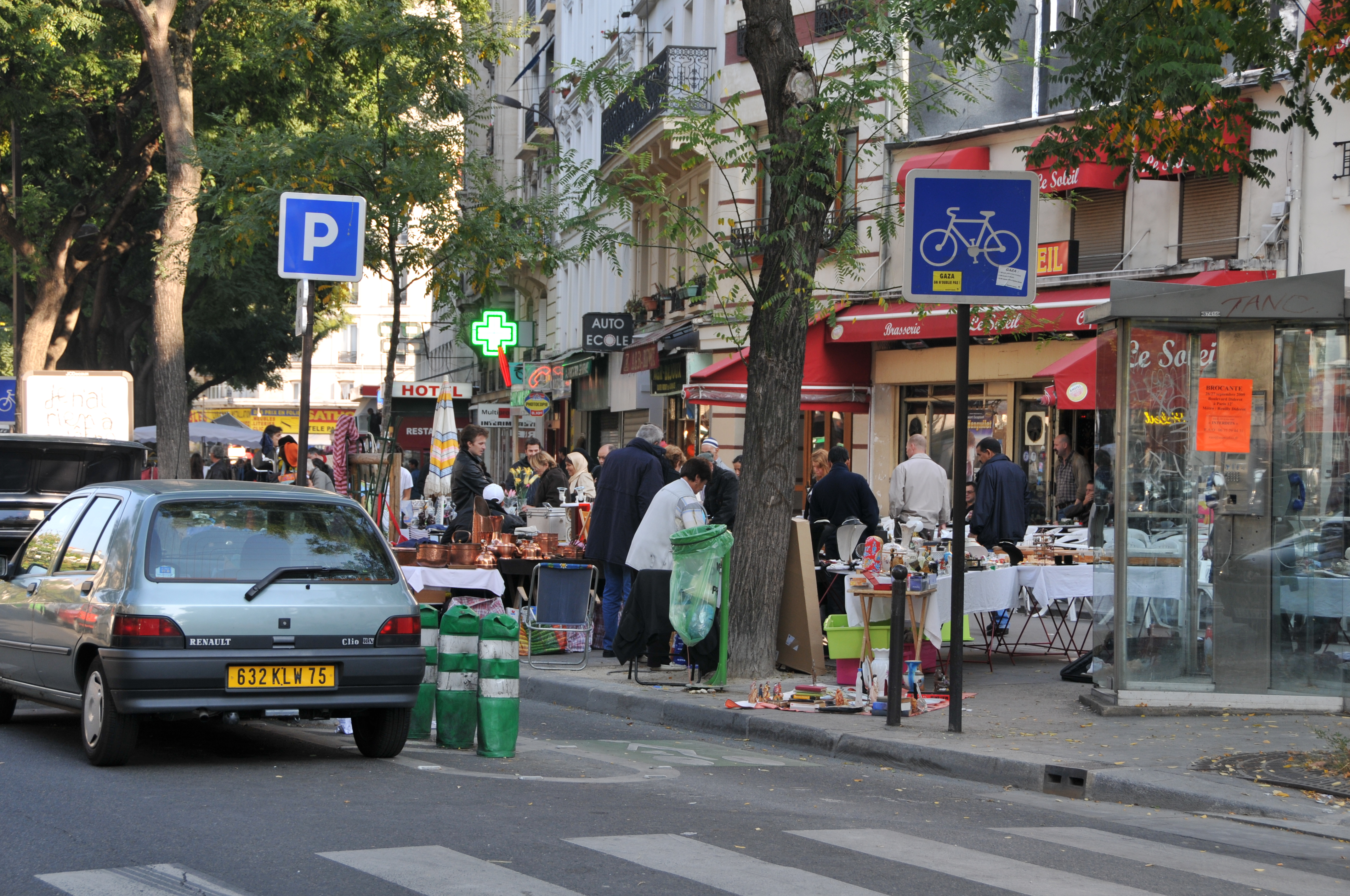 à Paris, dans le boulevard de Belleville.